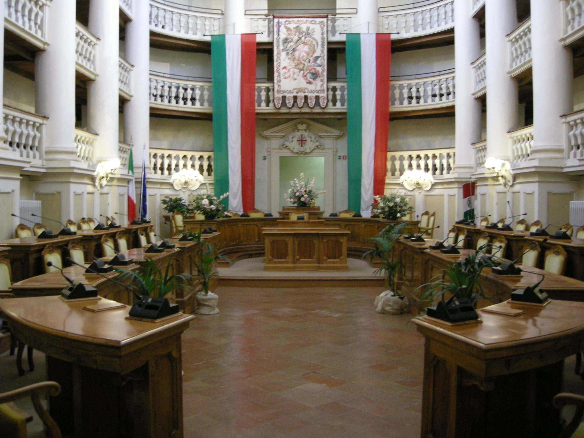 Sala del Tricolore